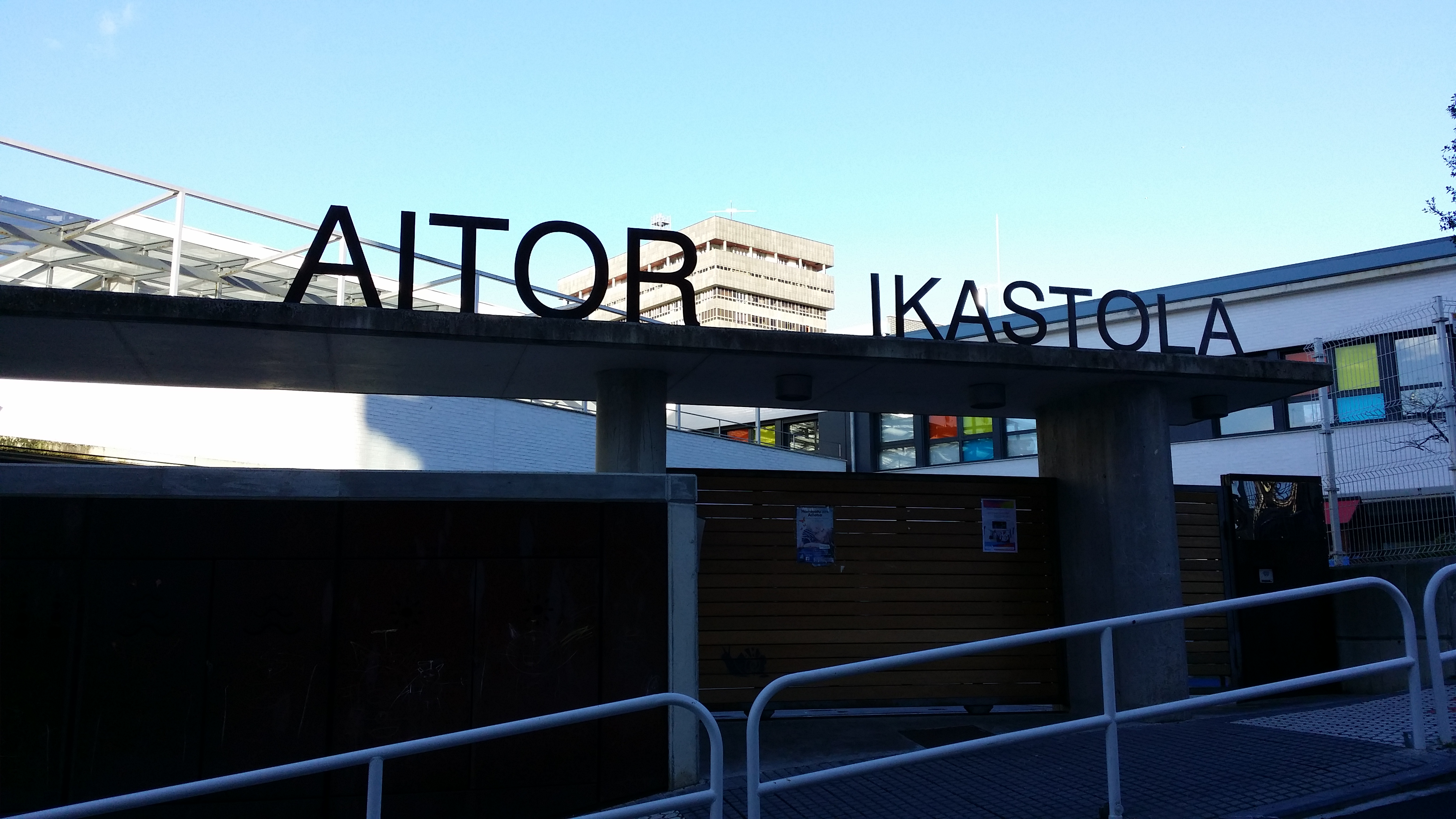 Aitor ikastola Egia auzoan